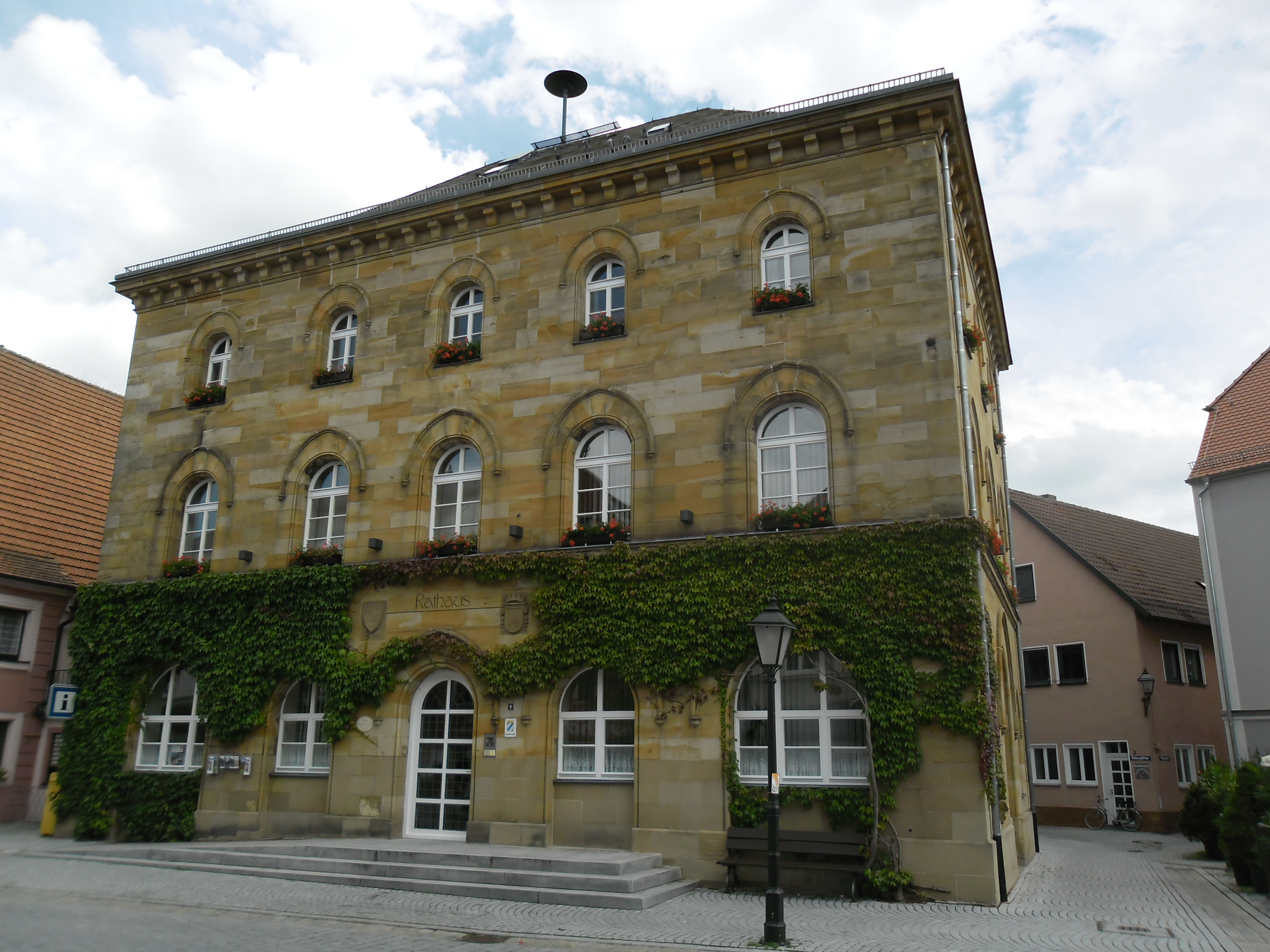 Rathaus an der Marktstraße 9